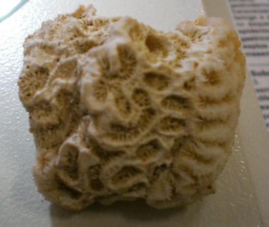 Mussismilia sp., esqueleto colonial o corallum, Campinas, São Paulo, Brasil